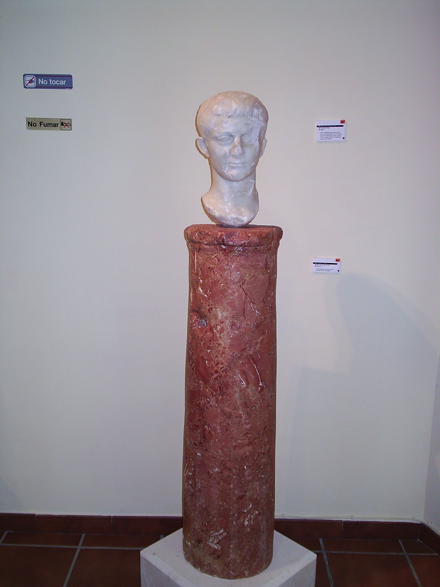 Cabeza de Tiberio Joven, Museo Histórico Municipal, Teba - Málaga - España